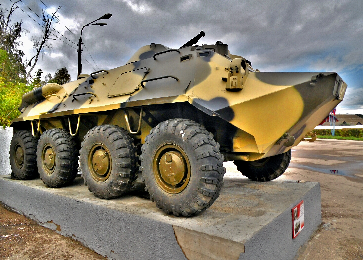 Бронетранспортер БТР-60М в Шатках.